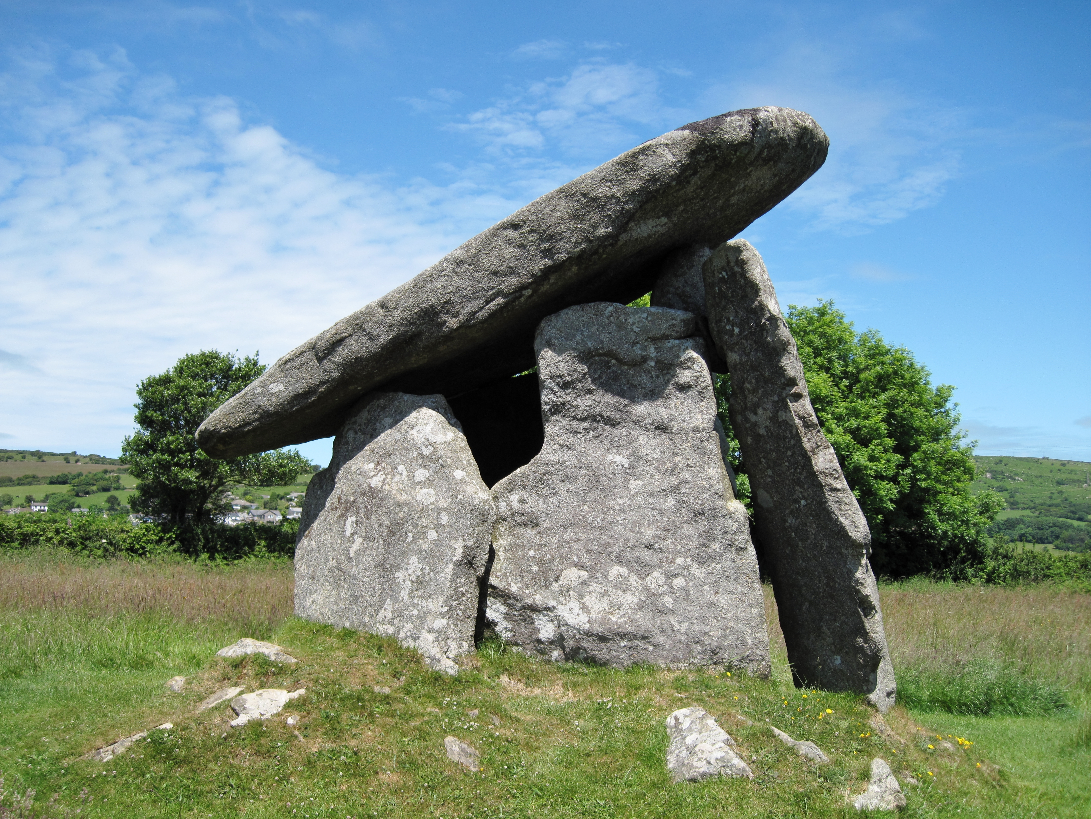 Trethevy Quoit, ein etwa 5500 Jahre alter Dolmen aus der Jungsteinzeit in Cornwall, England